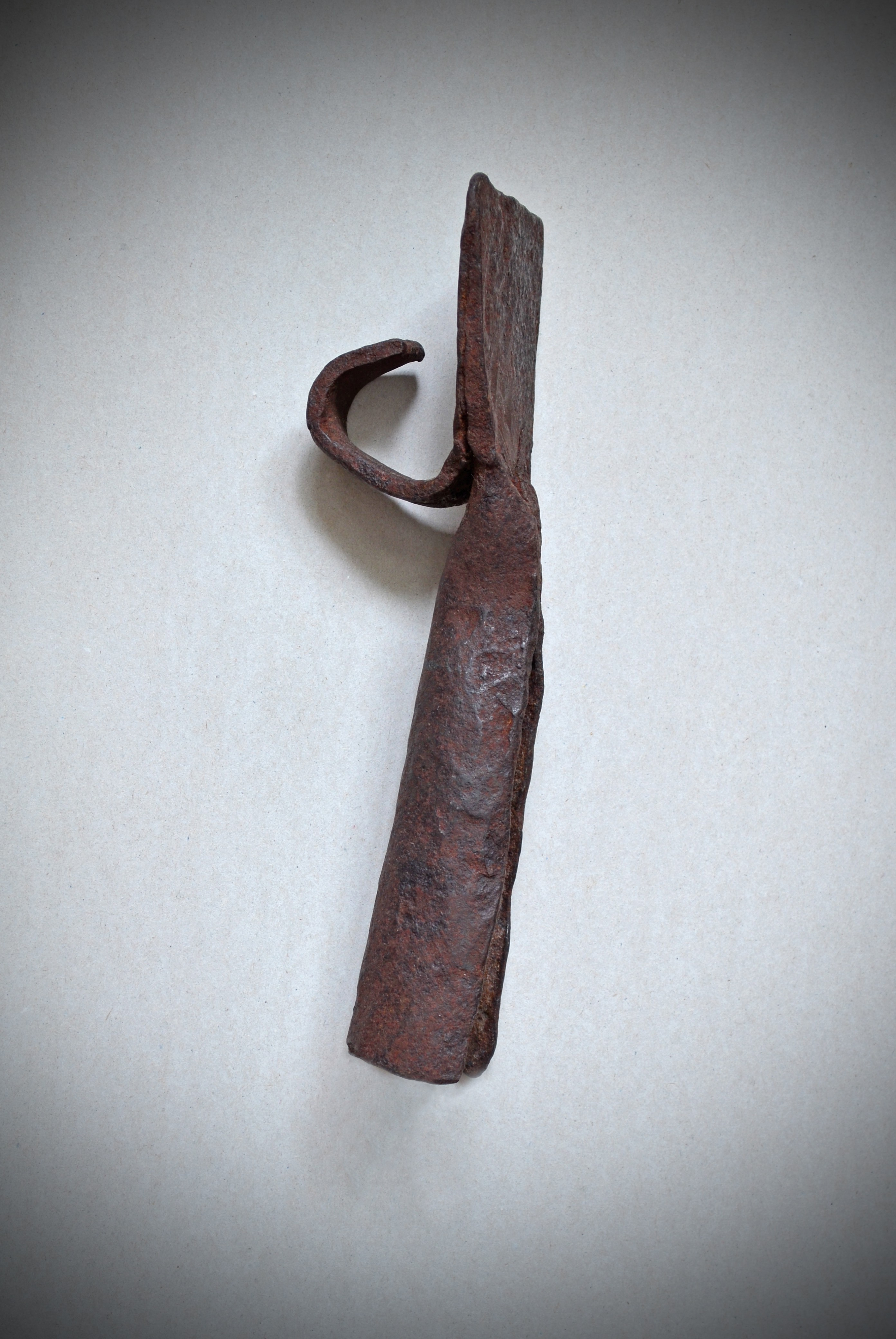 Чапельник кованый с втульчатым основанием.Рязанская губерния,19 век.